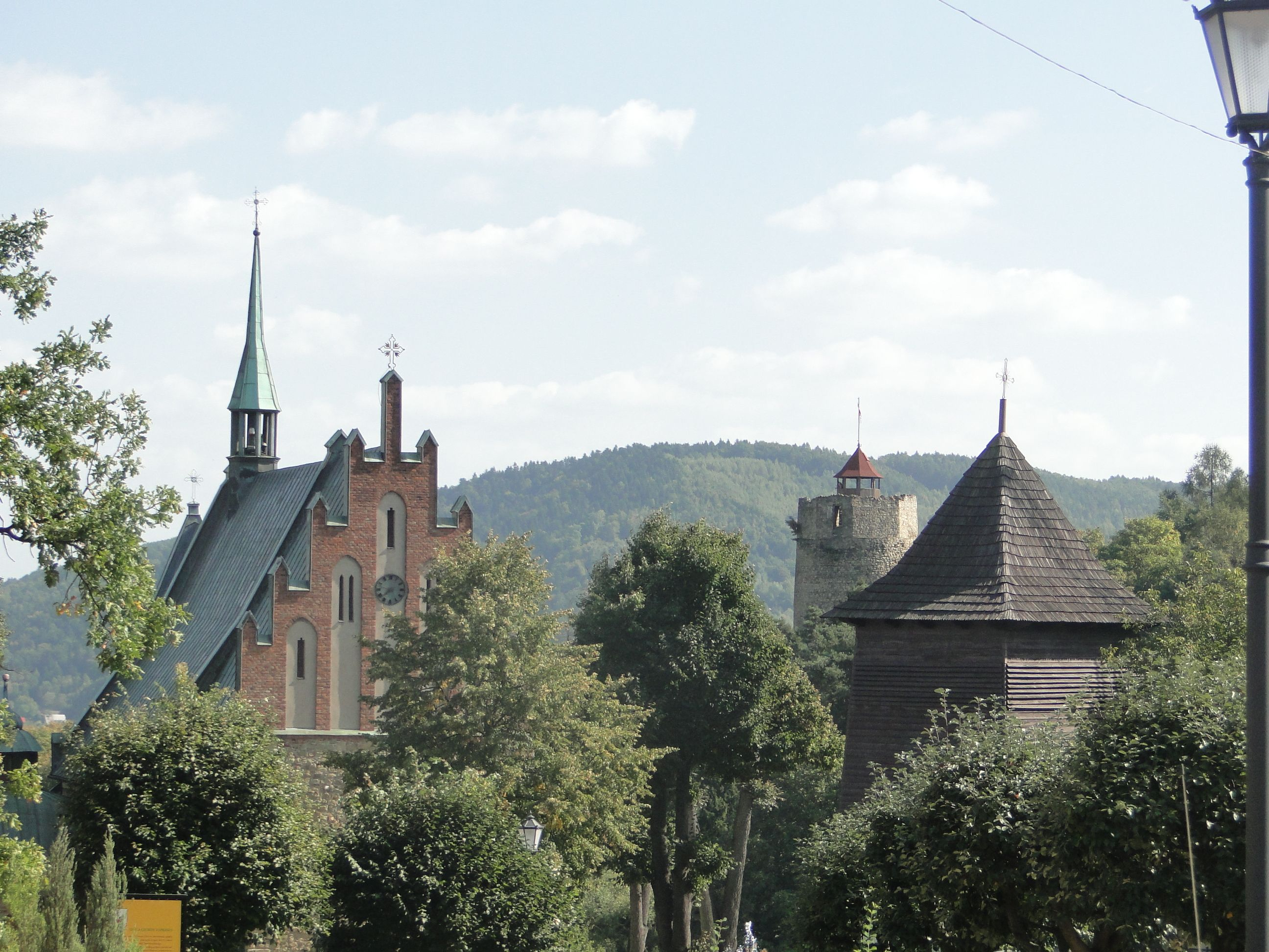 Kościół par. p.w. Narodzenia NMP w Czchowie (zabytek nr rejestr. A-9). W tle fragment Baszty Czchowskiej